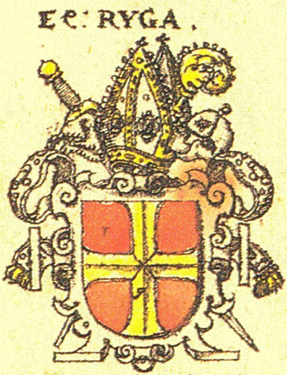 Wappen des Bistums Riga nach Siebmachers Wappenbuch